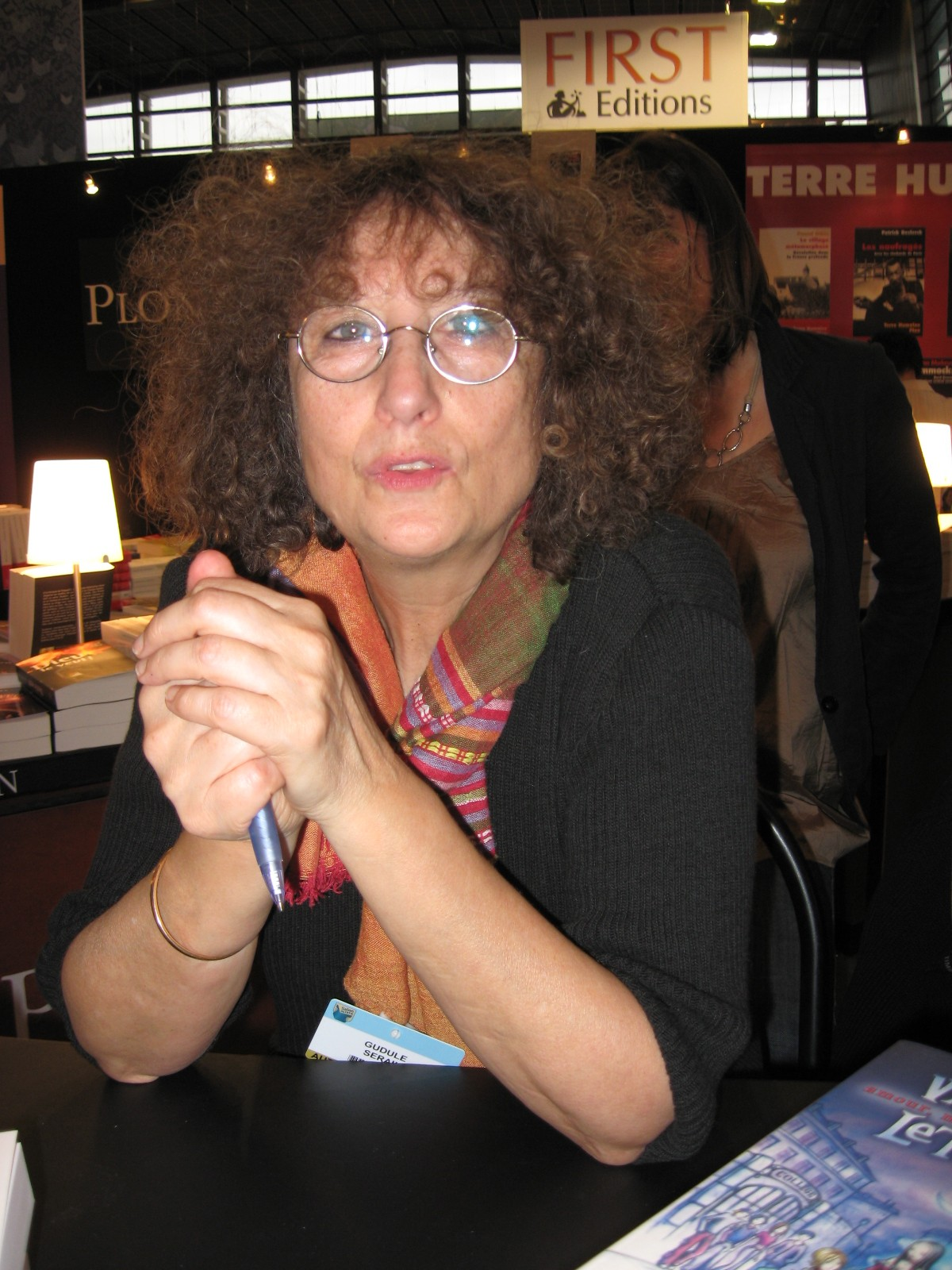 Gudule, auteur jeunesse au salon du livre de Paris